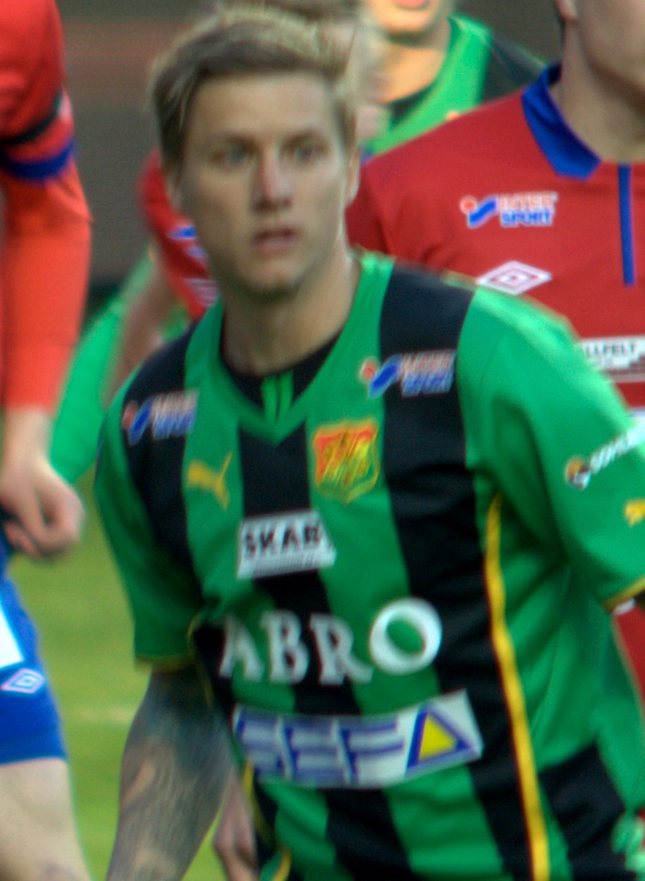 GAIS player Andres Drugge.